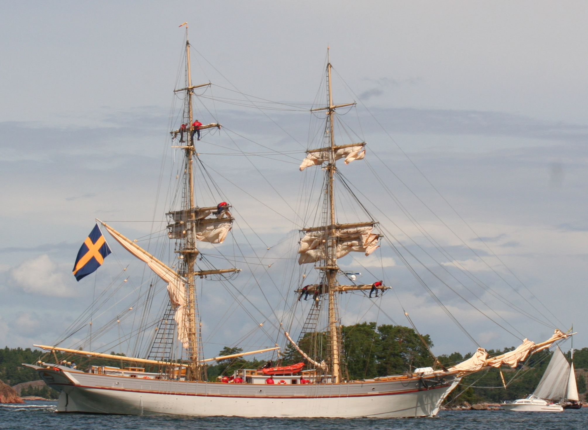 Briggen Tre kronor af Stockholm på Saxarfjärden i Stockholms skärgård, på väg mot Sandhamn under Tall Ships' Races. MMSI number: 266271000 Callsign: SBDP Length: 35 m Beam: 8 m Källa: eget foto, fotograf EnDumEn 30 juli 2007